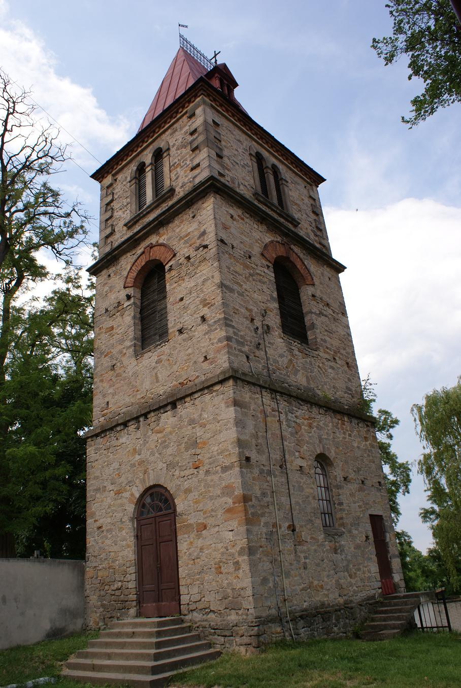 Dzwonnnica przy kościele św. Władysława w Kunowie